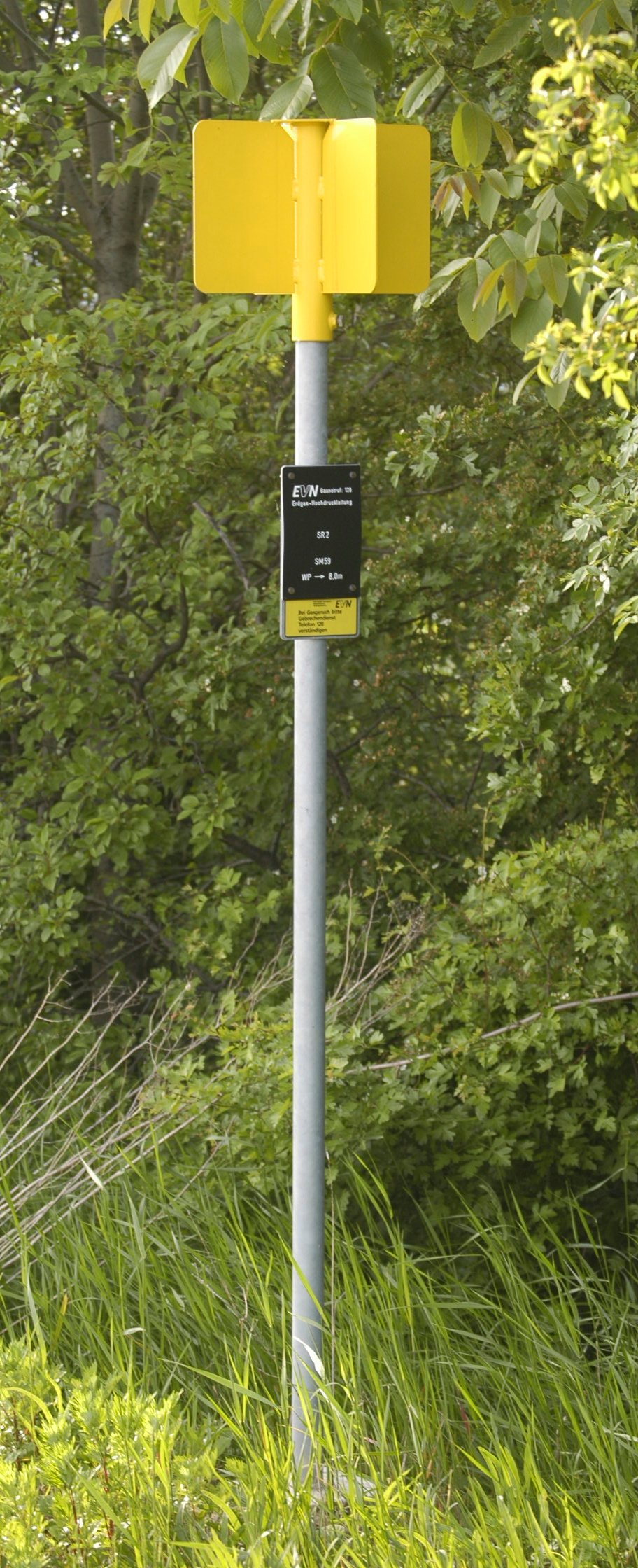 Marker einer Rohrleitung in der Erdgas transportiert wird